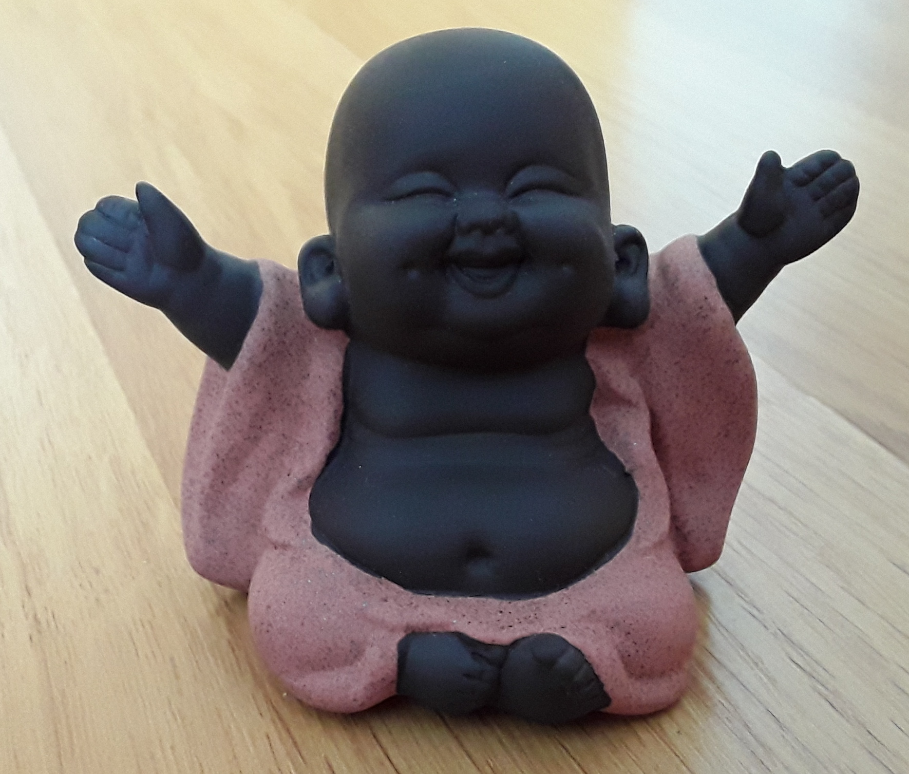 tea